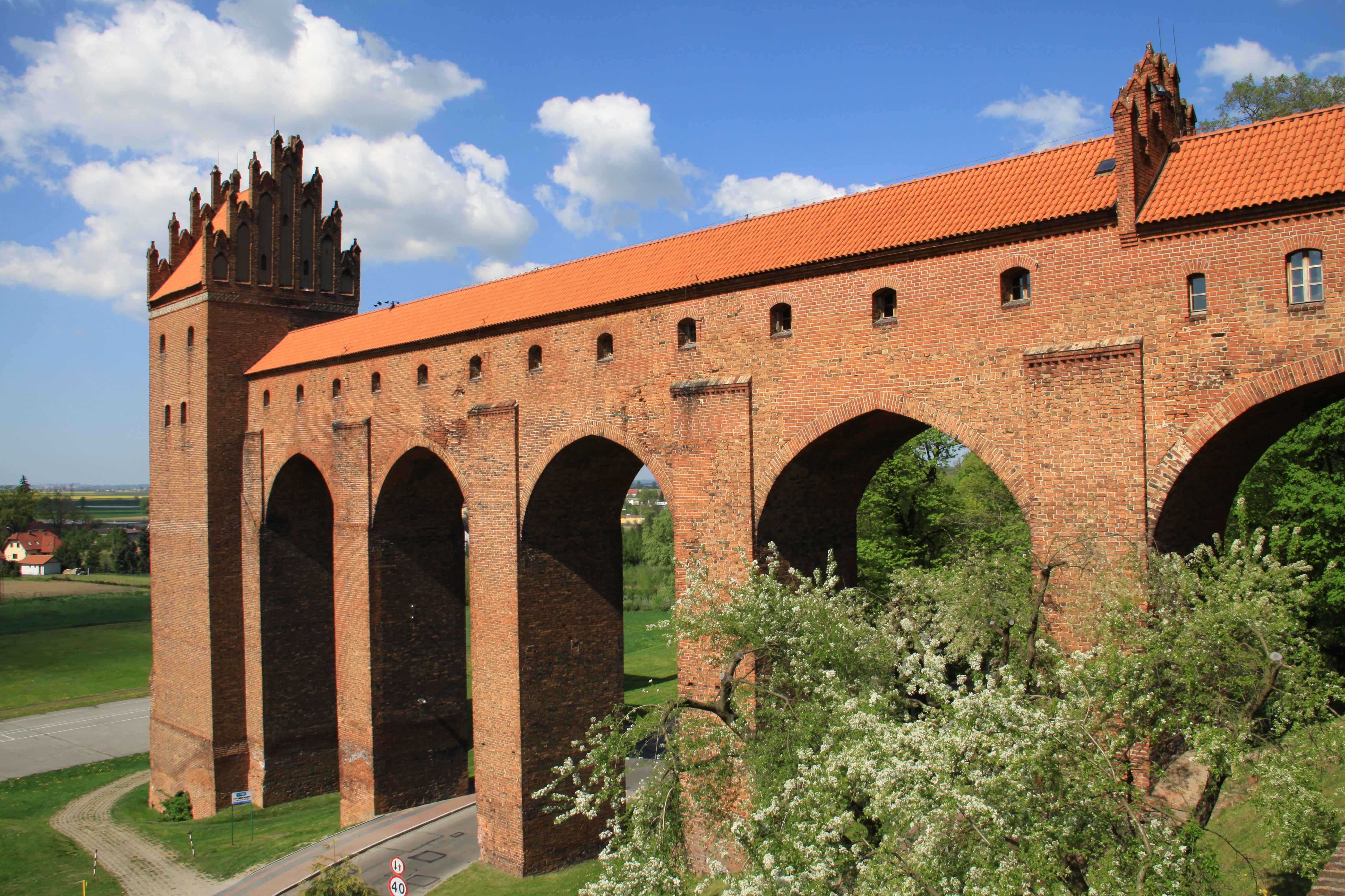 Kwidzyn - Zamek Kapituły Pomezańskiej, obecnie muzeum, ok. 1322-XIX